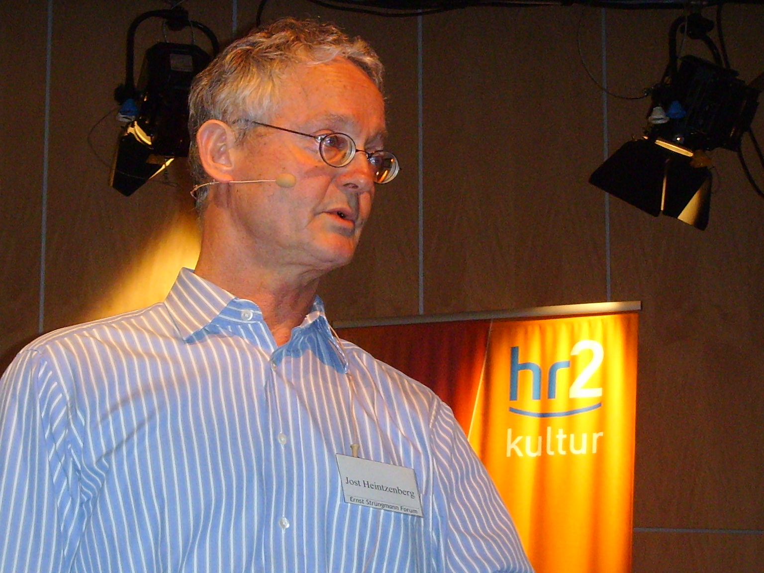 Prof. Dr. Jost Heintzenberg, Leiter der Abteilung Physik am Leibniz-Institut für Troposphärenforschung, Leipzig, und des Arbeitsgebietes Physik der Atmosphäre der Fakultät für Physik und Geowissenschaften an der Universität Leipzig